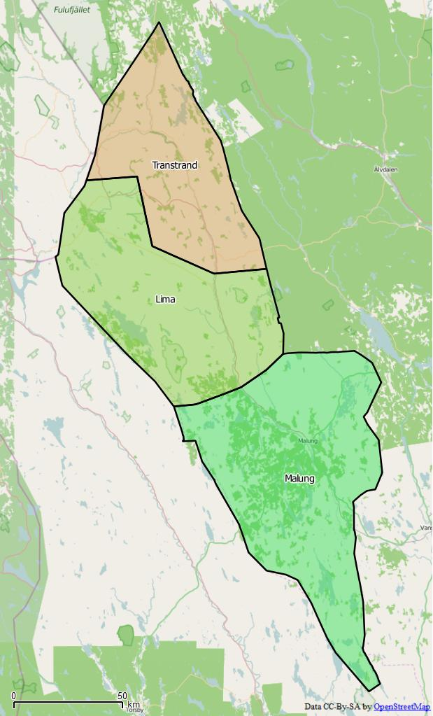 Distriktsindelningen i Malung-Sälens kommun World file: 321.70326483723061983 0 0 -321.70326483723061983 1385099.52496513142250478 8756522.61493952944874763